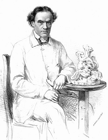 French ceramist Charles Avisseau (1796-1861)